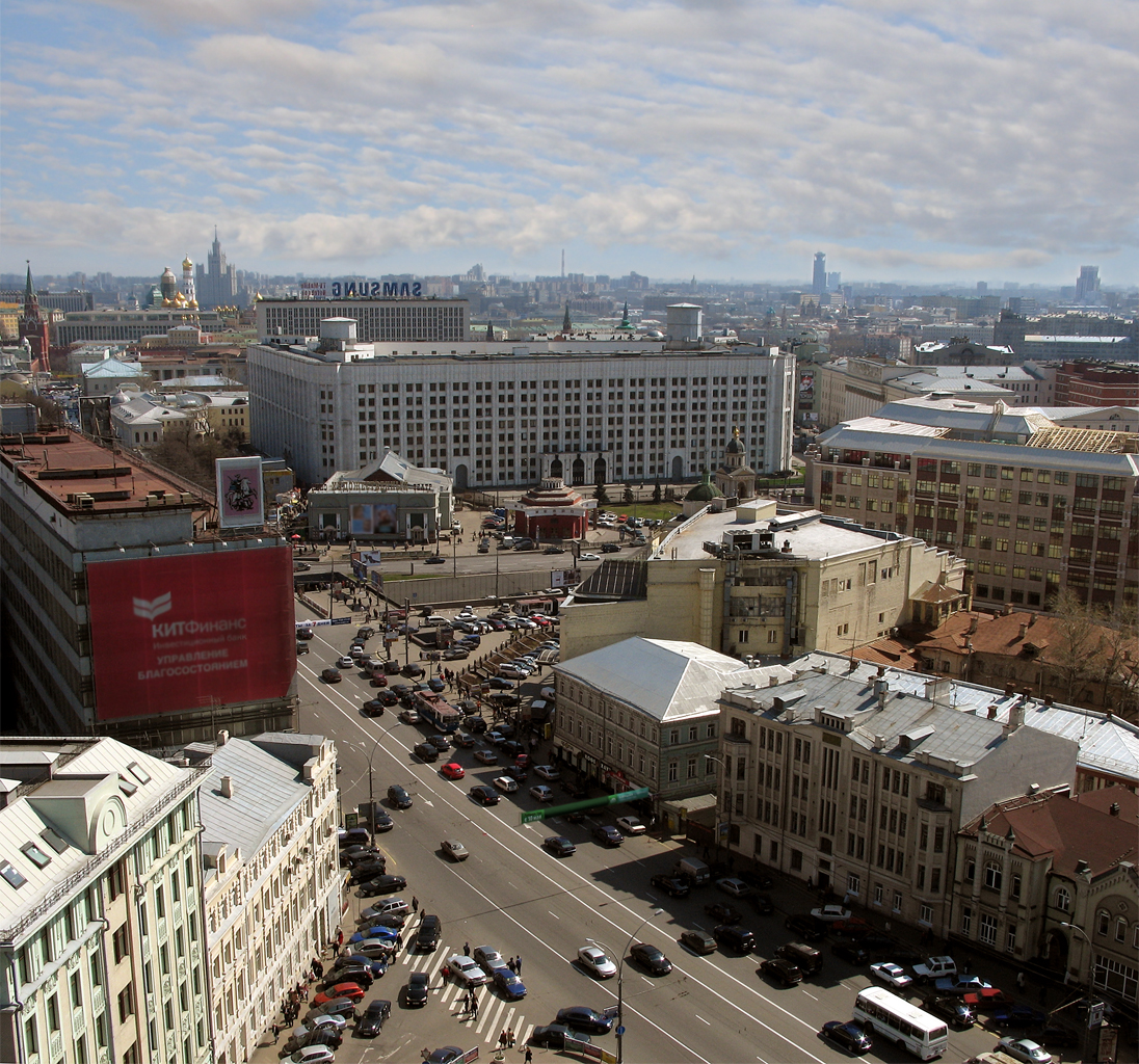 Москва, Арбатская площадь, кинотеатр "Художественный"